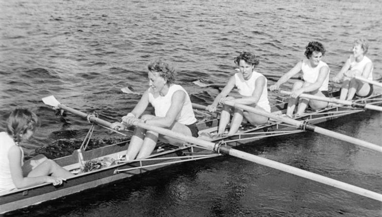 SC DHfK Leipzig, Doppelvierer Zentralbild Ulmer 3.8.1958 Wendorf Deutsche Meisterschaften der Ruderer Am 2. und 3.8.1958 finden in Berlin-Grünau die Deutschen Meisterschaften der Ruderer, Jugendmeisterschaften und Nachwuchsbestenkämpfe statt. UBz: Deutscher Meister beim Doppelvierer mit Steuermann für Frauen wurde der SC DHfK Leipzig mit: K. Frister (Steuermann), G. Heisse, R. Harre, H. Weissig und B. Raue.